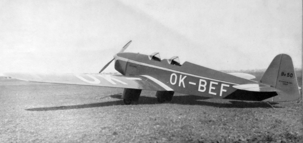 letecký motor Walter Minor 4 a letoun Be-50 (1935)